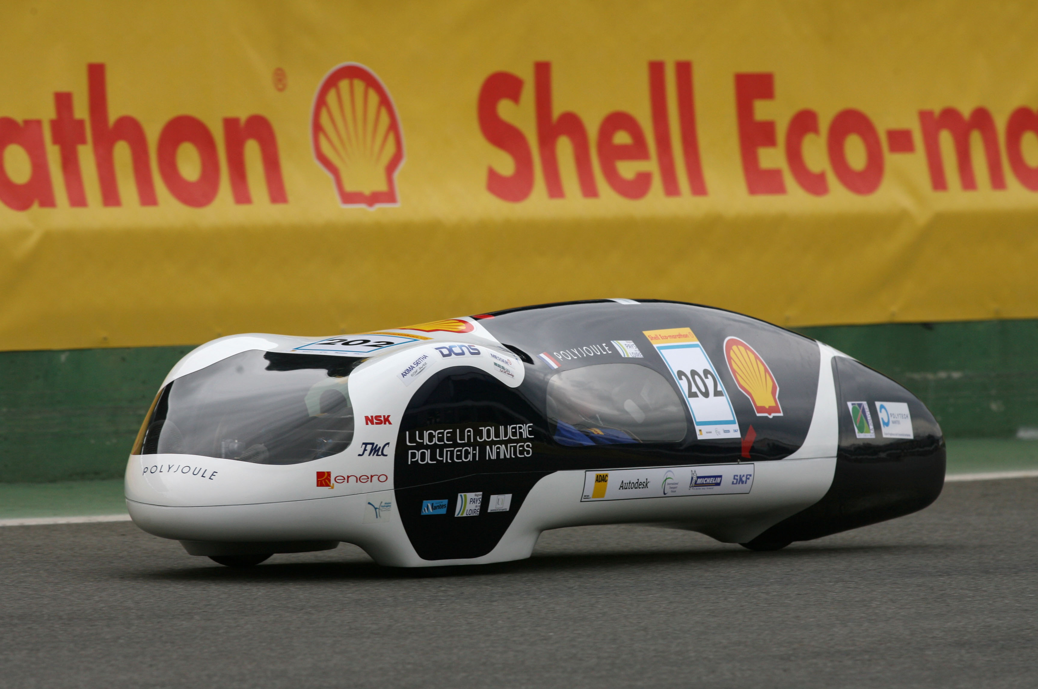 Photo du véhicule polyjoule 2010